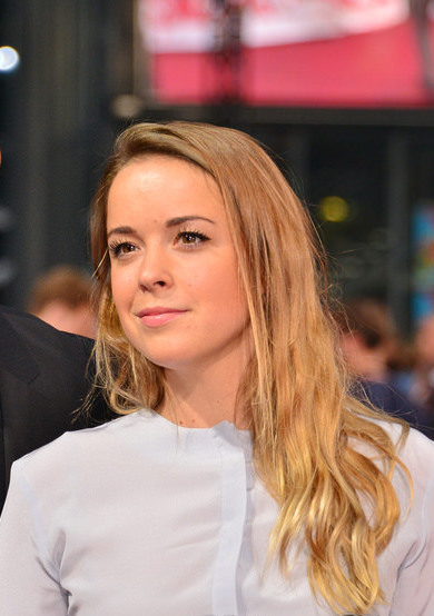 Marina Hoermanseder